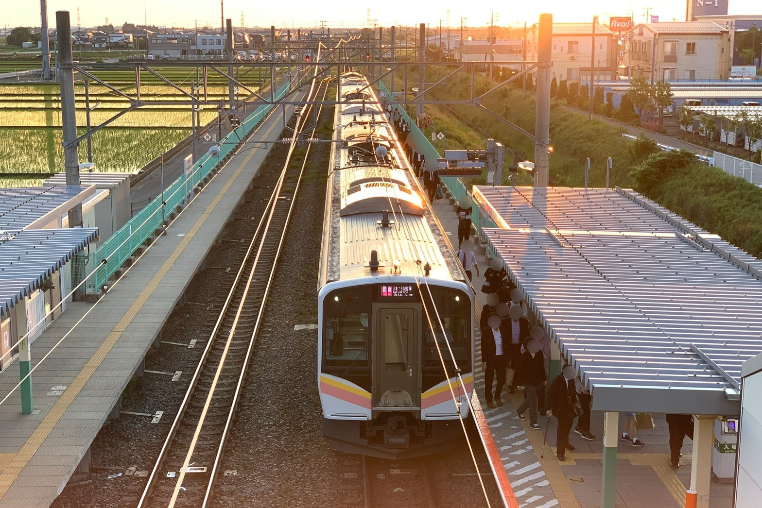 白新線西新発田駅のホーム（2020年5月）無人駅ではあるものの、ラッシュ時は通勤通学客で混雑するため、注意喚起の放送が流れている（撮影日は学休日のため写っているのは通勤客のみ）